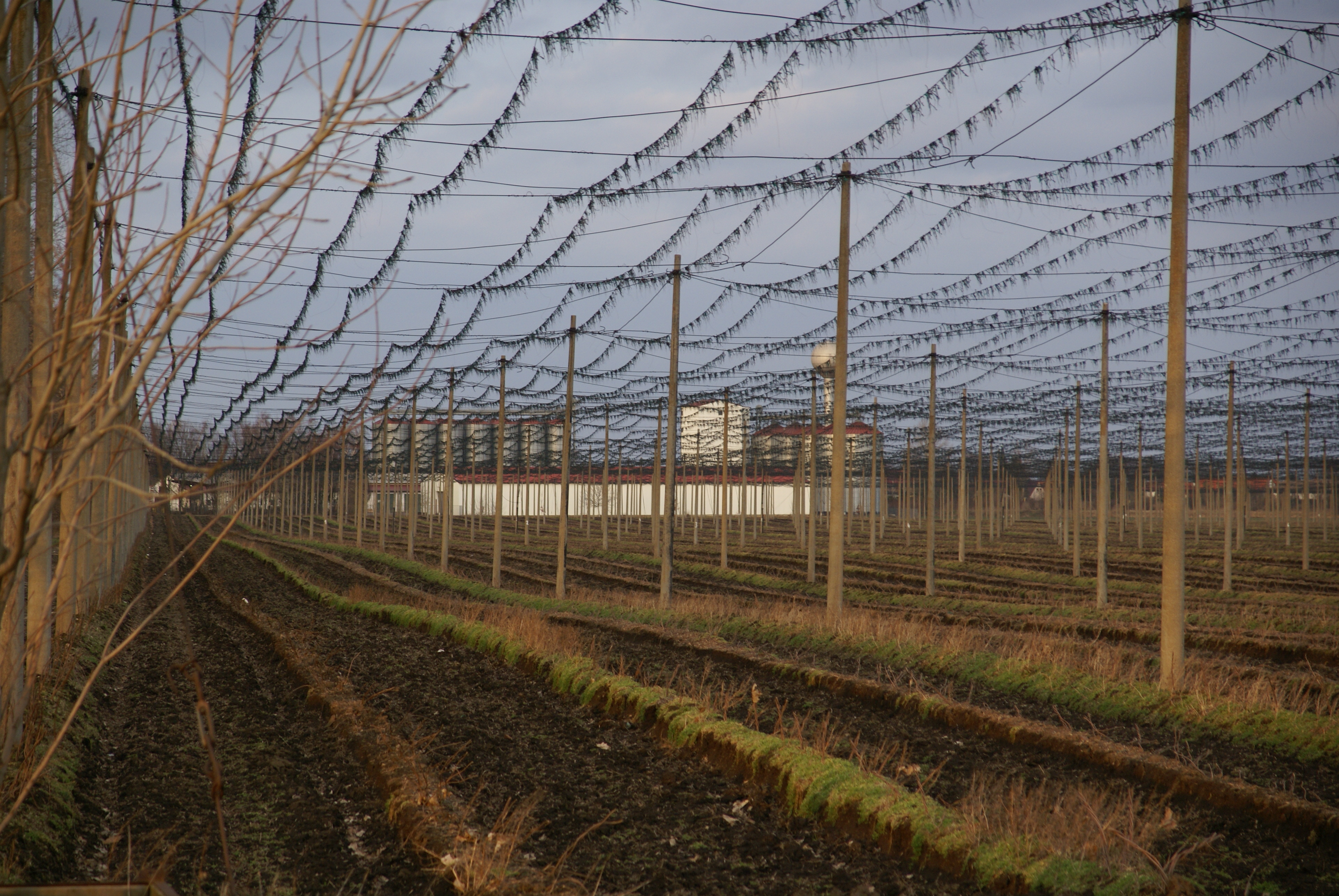 Blick durch die abgeerntete Hopfenplantage bei Beesenstedt auf das Lagergebäude